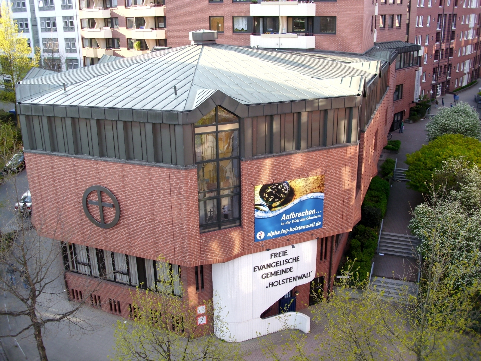 Freie evangelische Gemeinde Hamburg Haus Michaelisstraße vom Turm des Kleinen Michels (Süden)